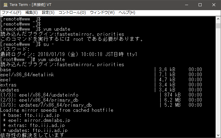 TeraTerm 編集画面